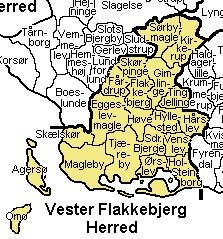 Vester Flakkebjerg Herred Sorø Amt , Denmark. Map by Svend-Erik Christiansen, edited by user:Nico-dk .